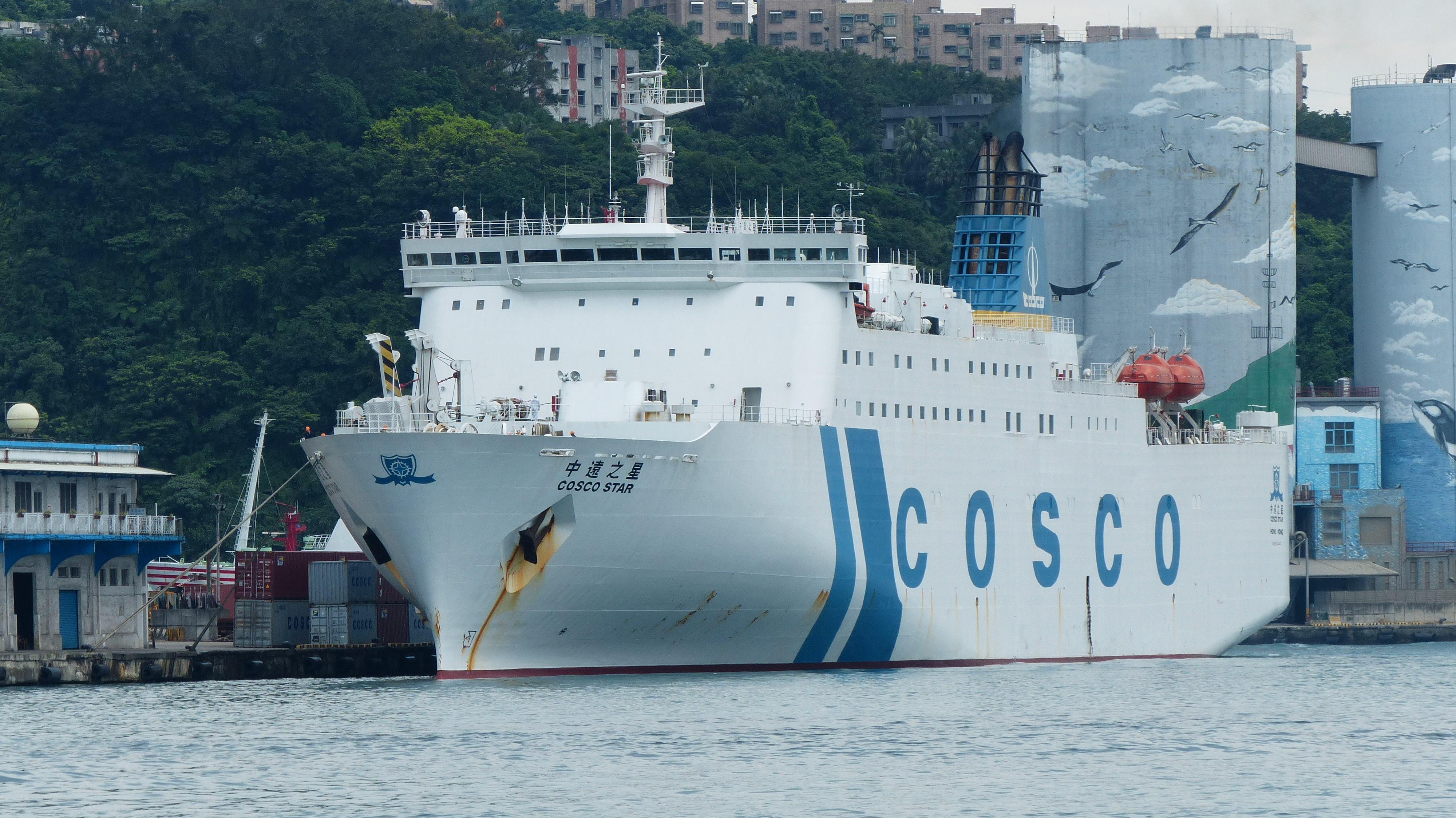 停泊於基隆港的中遠之星，攝於基隆海關大樓北面碼頭。